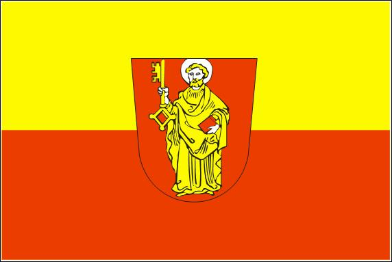 Flagge Stadt Trier This file depicts the flag of a German Körperschaft des öffentlichen Rechts (corporation governed by public law). According to § 5 Abs. 1 of the German Copyright law, official works like flags are gemeinfrei (in the public domain). Note: The usage of flags is governed by legal restrictions, independent of the copyright status of the depiction shown here.